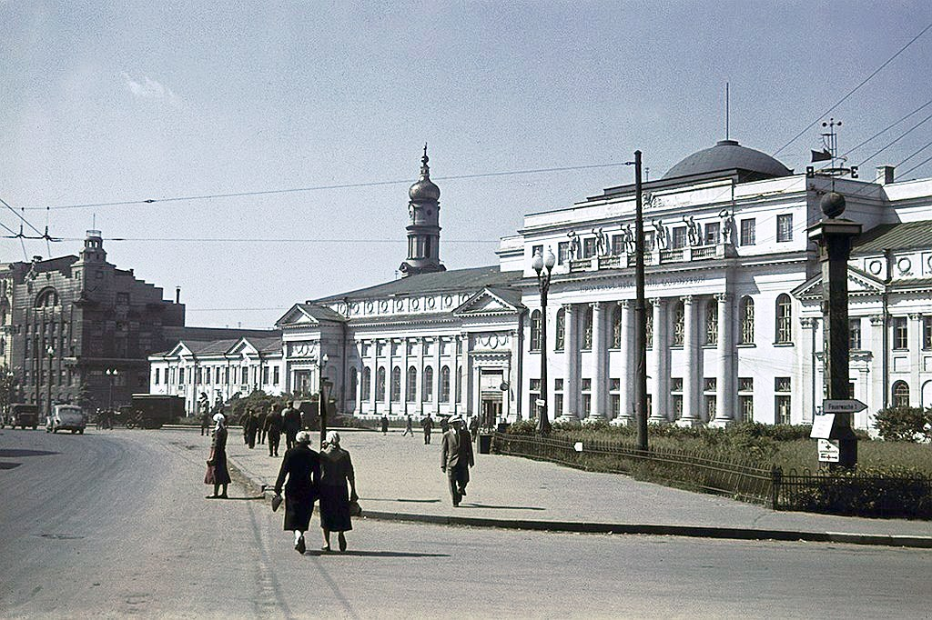 Дом дворянского собрания в Харькове на Николаевской площади (нынешняя площадь Конституции). В этом здании в конце декабря 1917 года была провоглашена советская власть на Украине, во второй половине 1919 года располагалась штаб-квартира командующего Добровольческой армии Май-Маевского и происходило действие фильма (1969) и книги Болгарина и Северского "Адъютант Его Превосходительства", в 1920—1934 гг. в этом здании располагалось правительство УССР. Разрушен в 1943 году. Фото периода германской оккупации Харькова. Лето 1942.